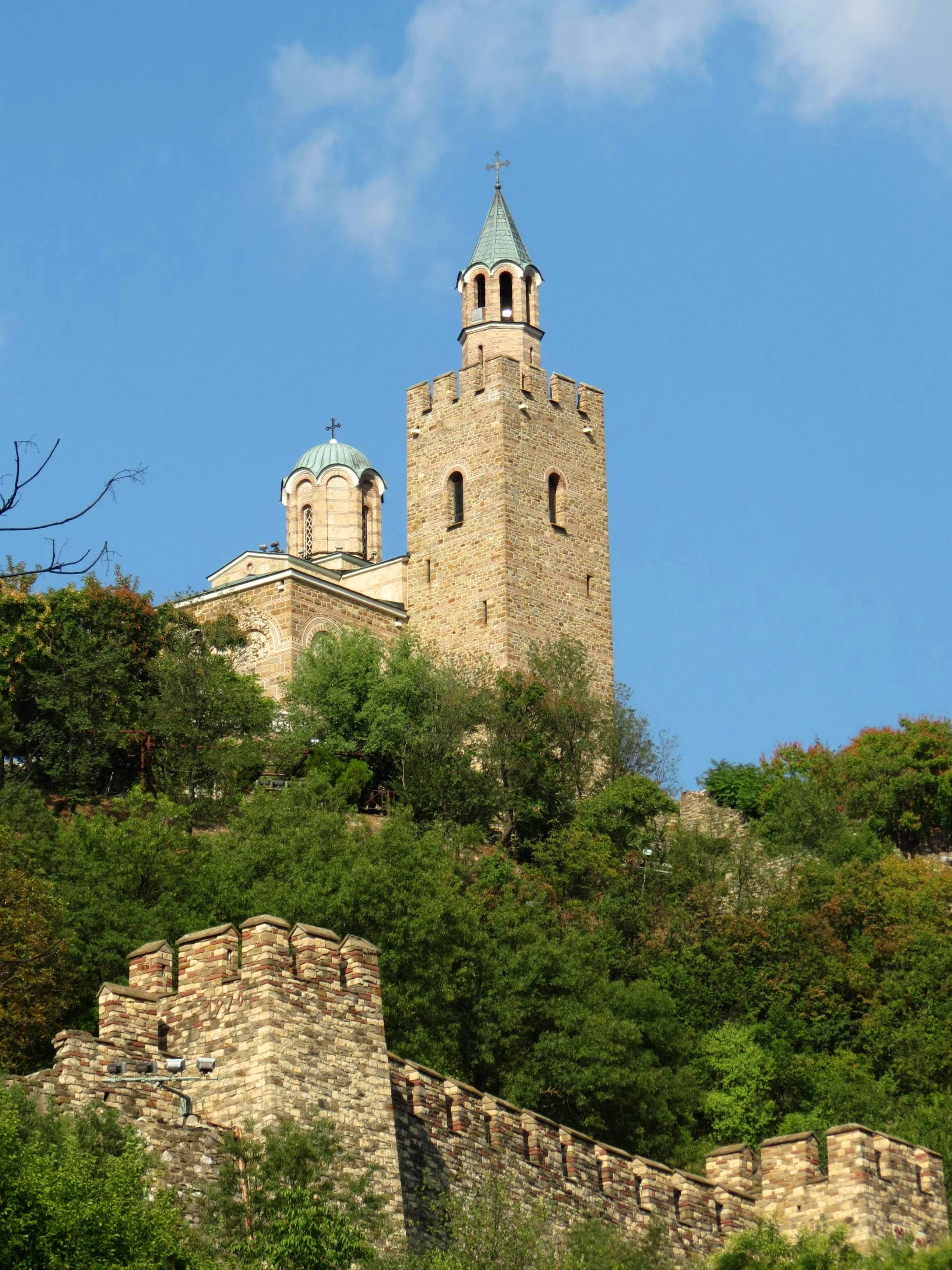 Патриаршески комплекс Царевец